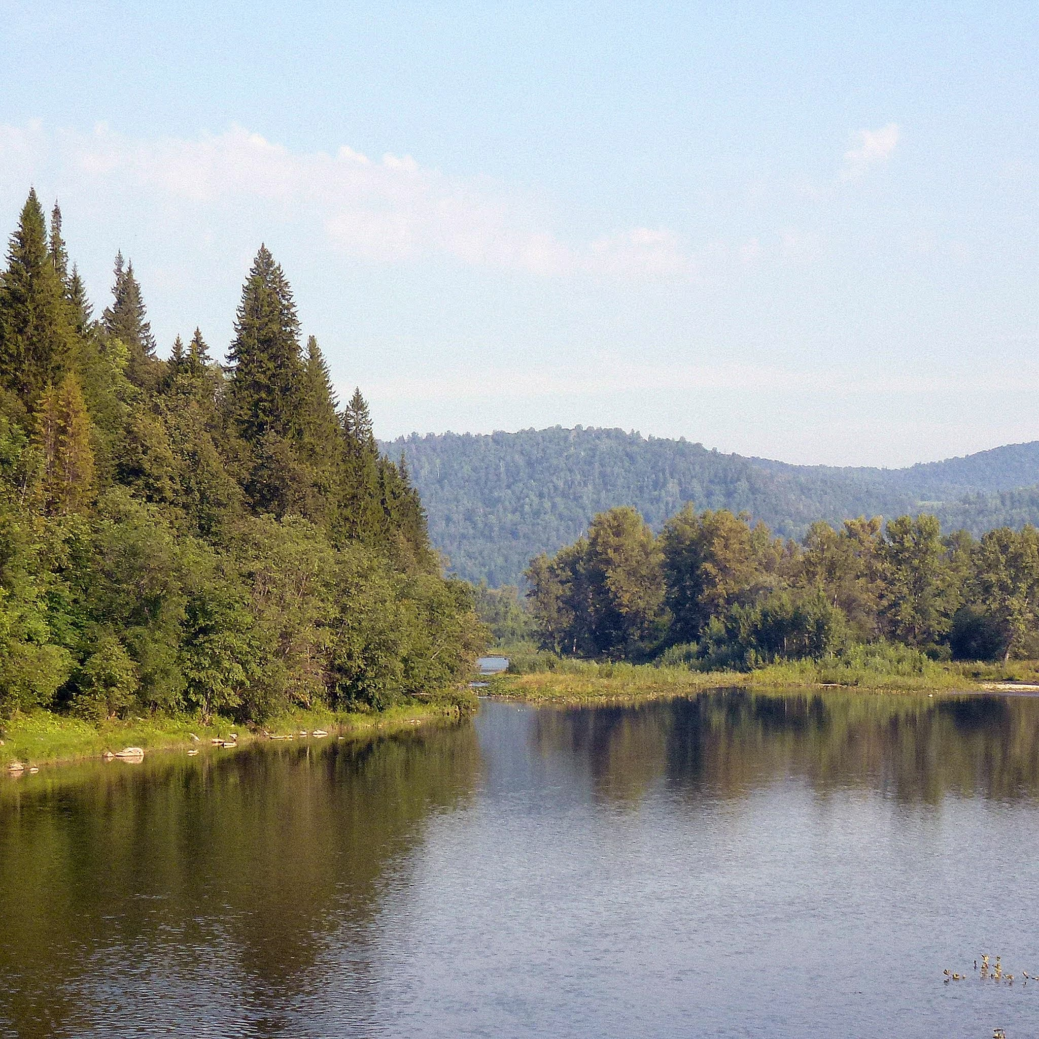 Река Инзер, Ассы, Башкортостан